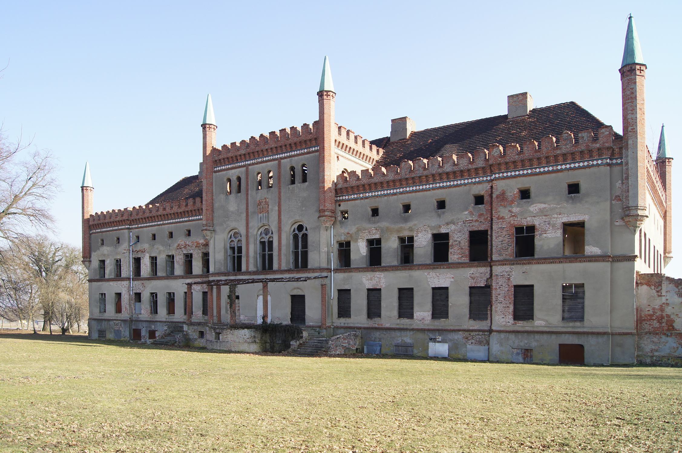 Schloss Broock Parkseite